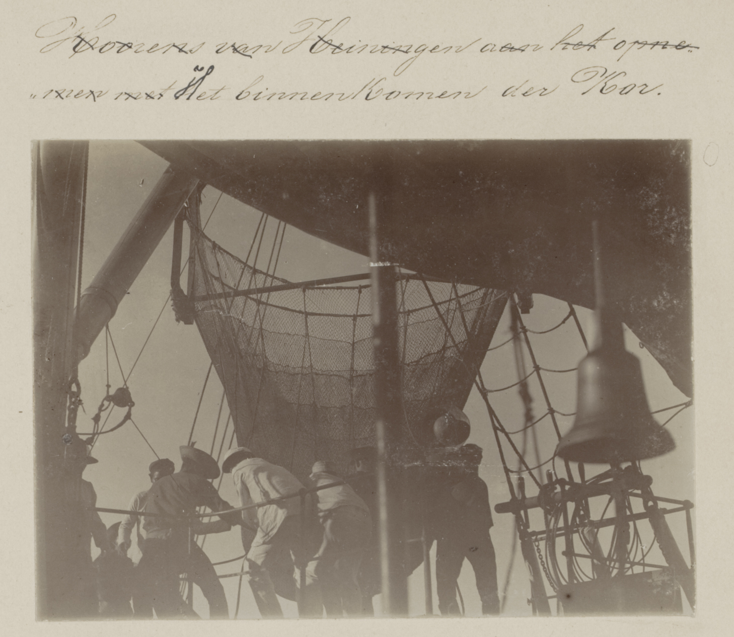 1899-1900, Siboga-expeditie naar Nederlands Oost-Indië, onder leiding van Max Wilhelm Carl Weber binnenhalen van de kor